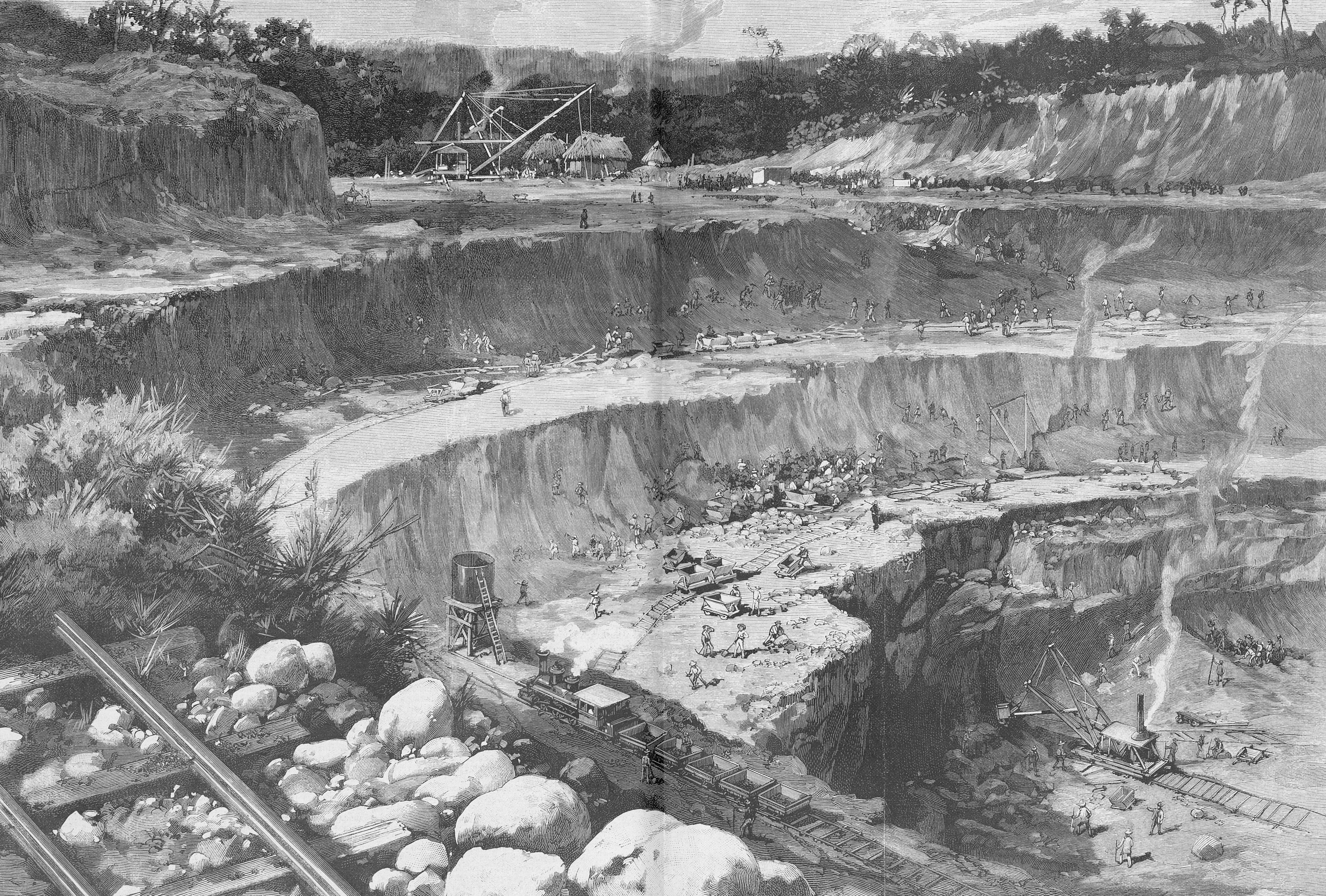 Сооружение Панамского канала, 1885 год